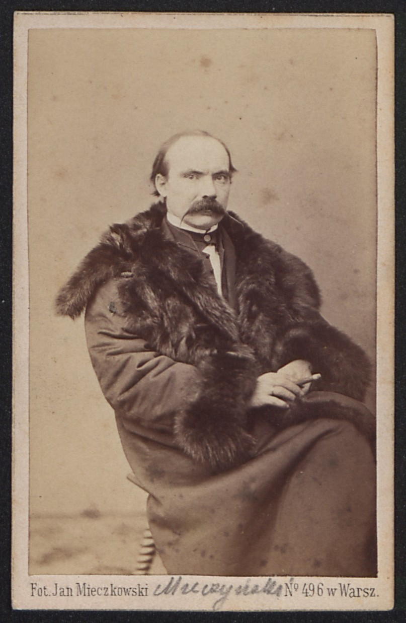 Adam Mieczyński, 1866 r.